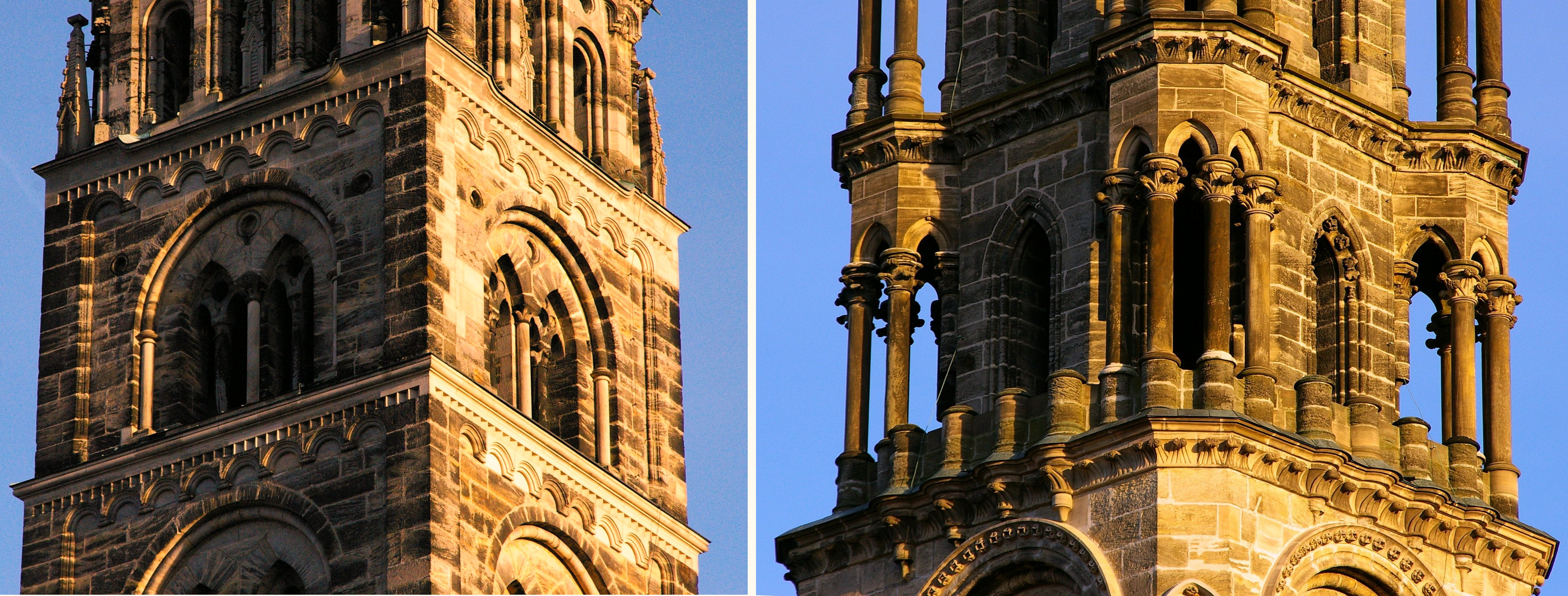 Bambewrg - Dom / Unterschied romanische-gotische Türme